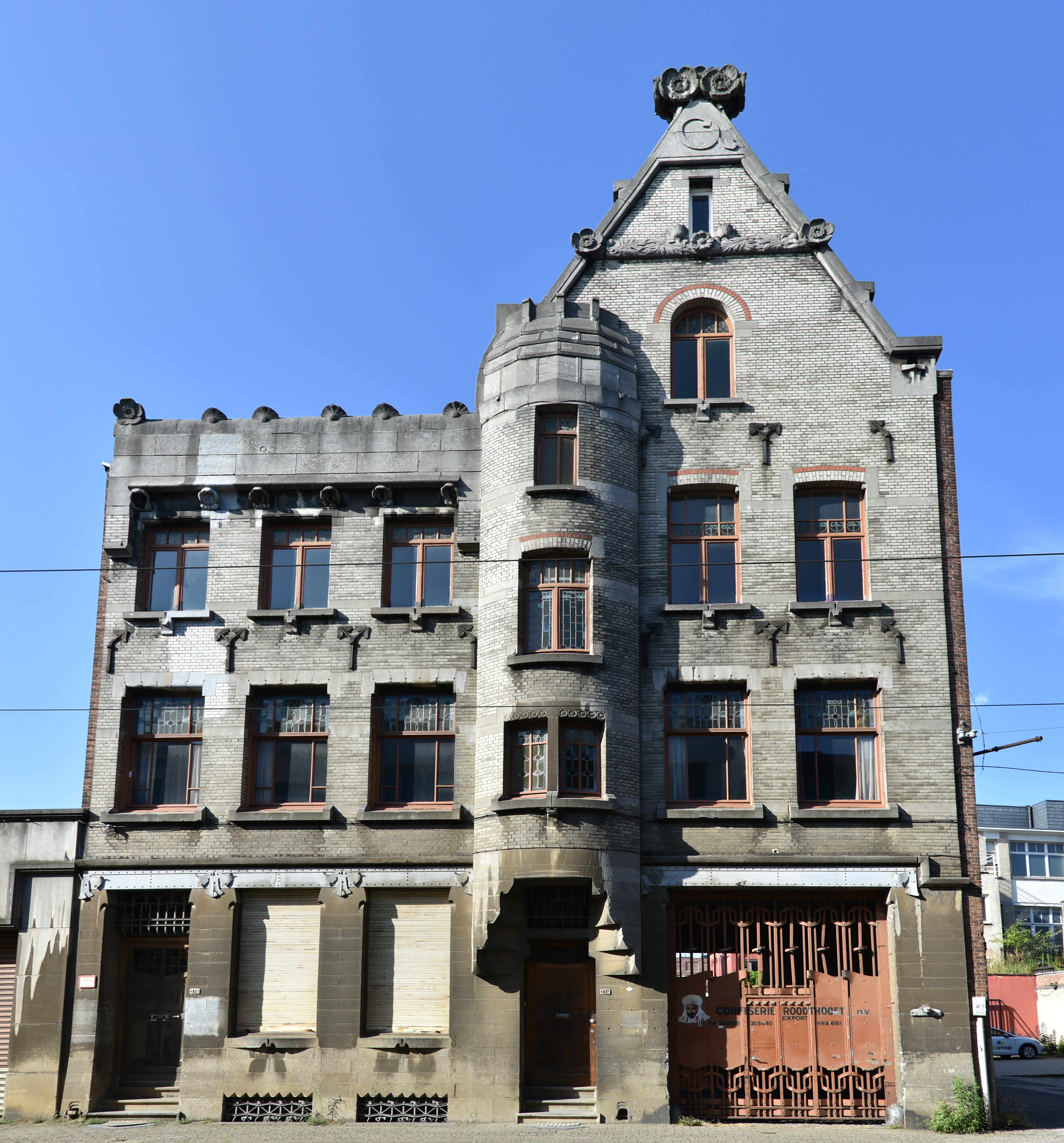 Confiserie Roodthooft Lange Leemstraat 374 (7164) Antwerpen 29-07-2019 This photo of immovable heritage has been taken in the Flemish Region